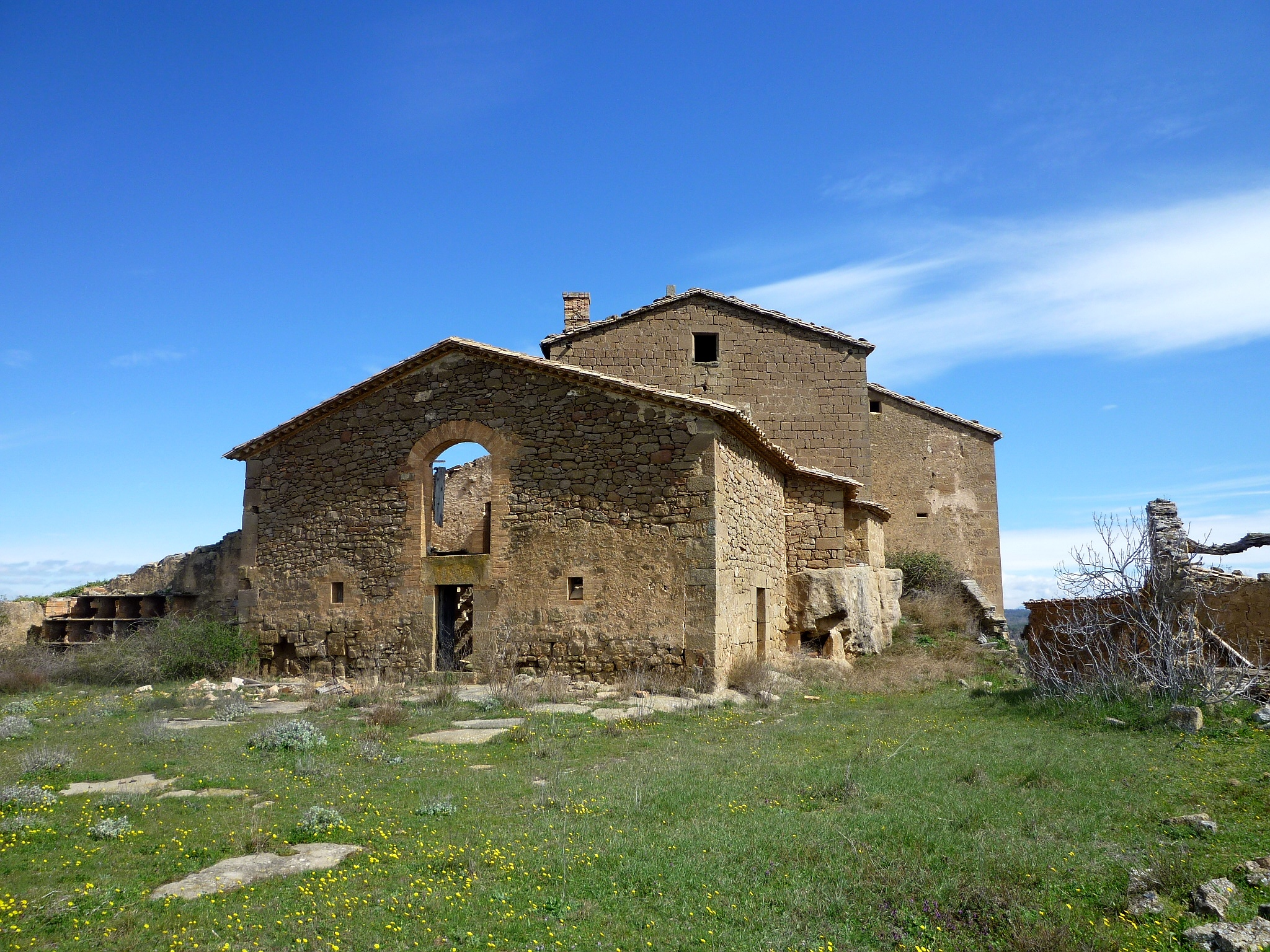 Masia del Mas d'en Forn, de Lloberola, municipi de Biosca a la Segarra. Conjunt des de l'era